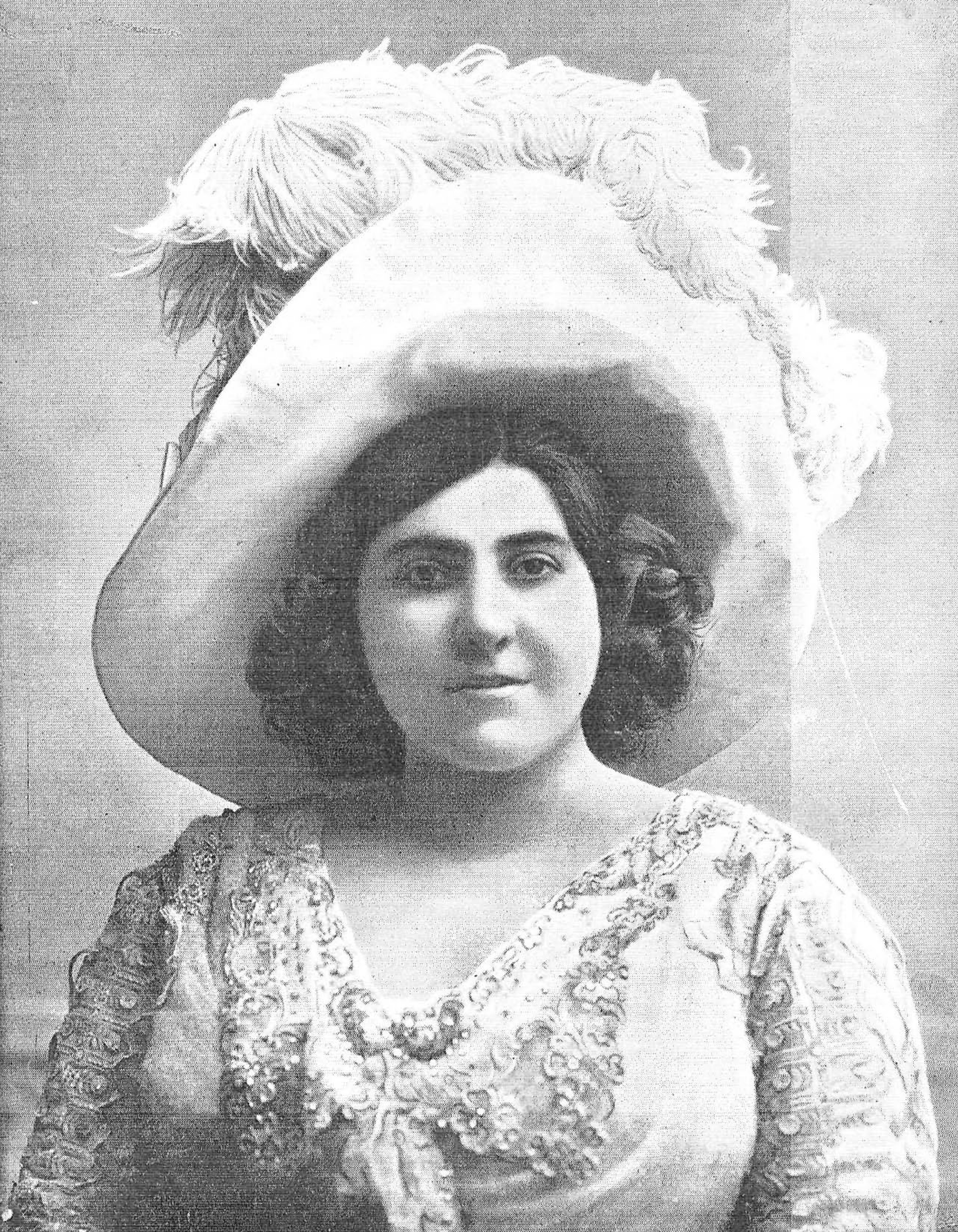 Carmen Andrés, popular tiple cómica del Teatro de Eslava.